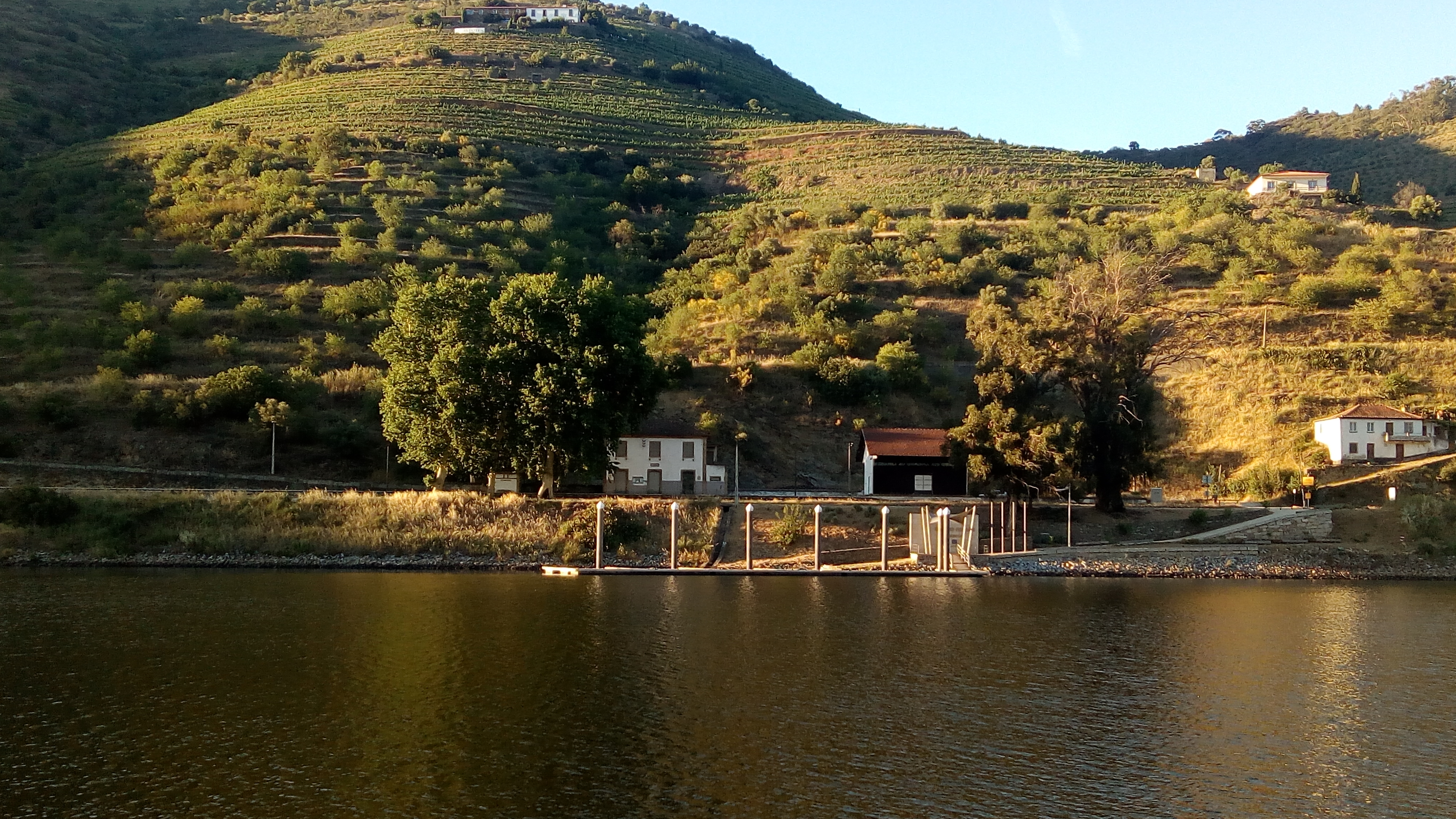 Vista do Cais do Ferrão, na Freguesia de Covas do Douro no Concelho de Sabrosa